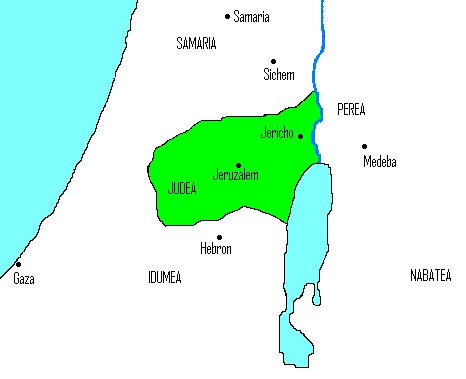 Categorie:Kaart Categorie:Afbeelding oudheid (Original text: Judea onder Judas Maccabeüs)